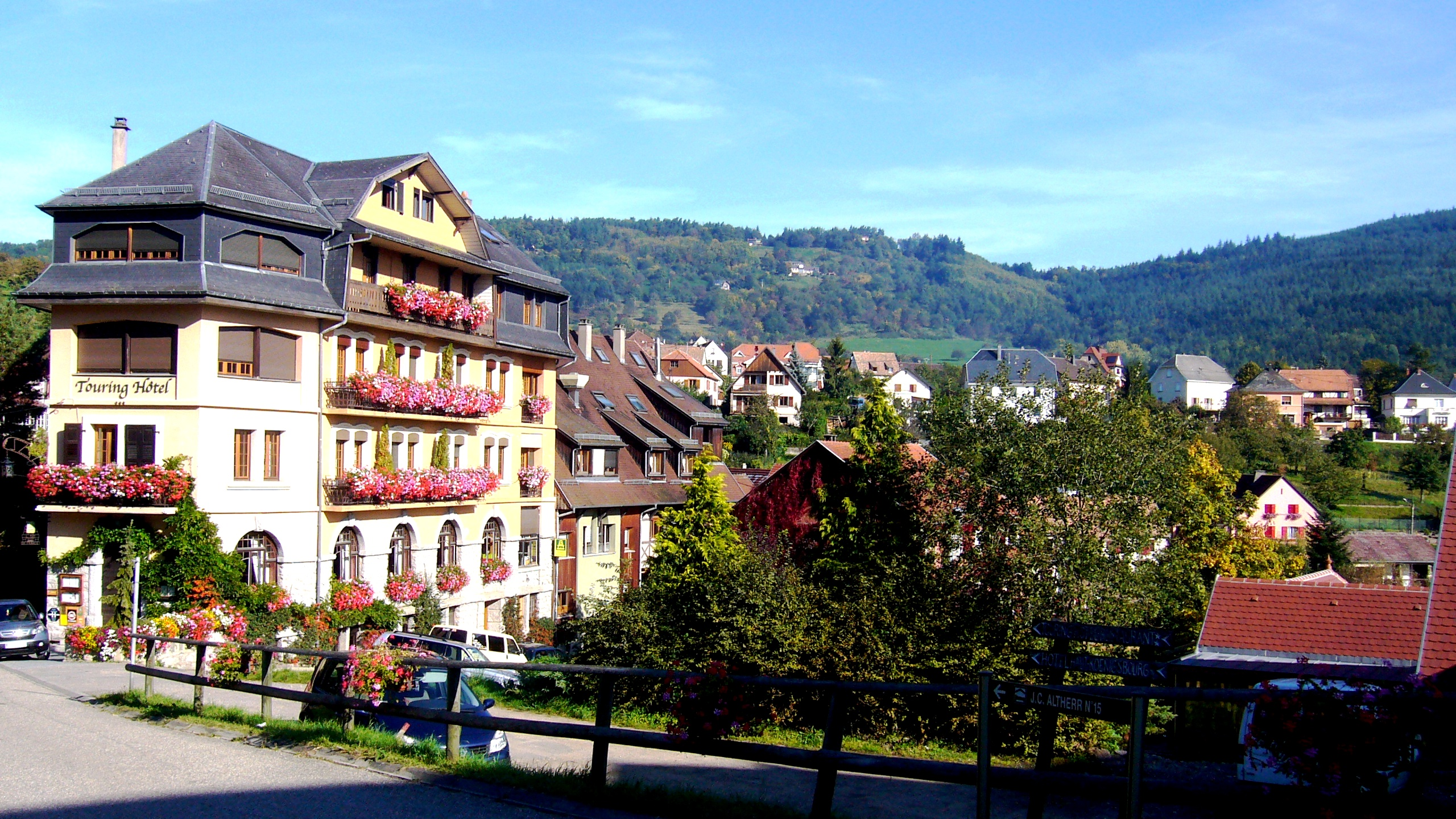 Hotel du Touring Club à Thannenkirch